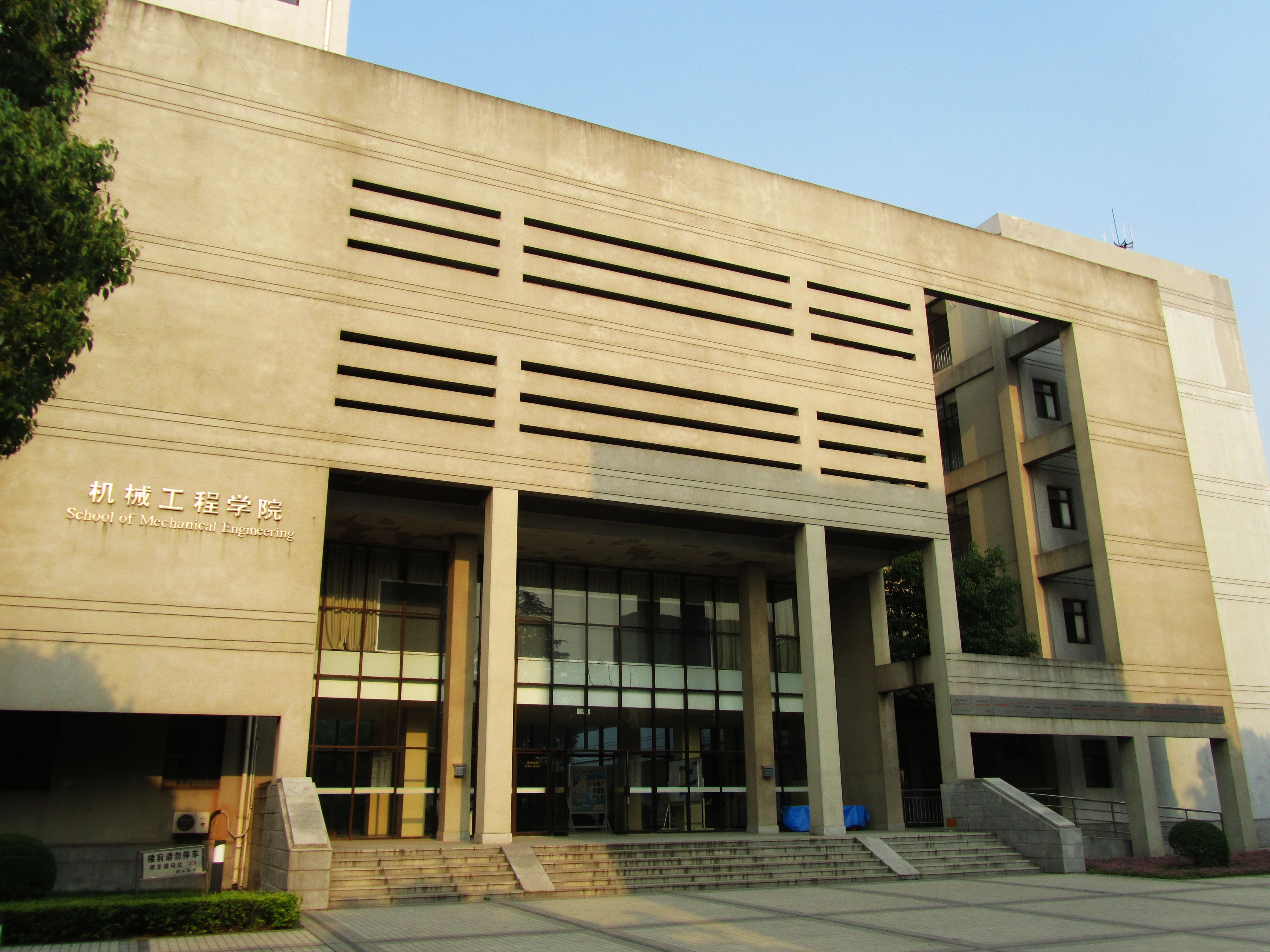 南京理工大学机械工程学院。